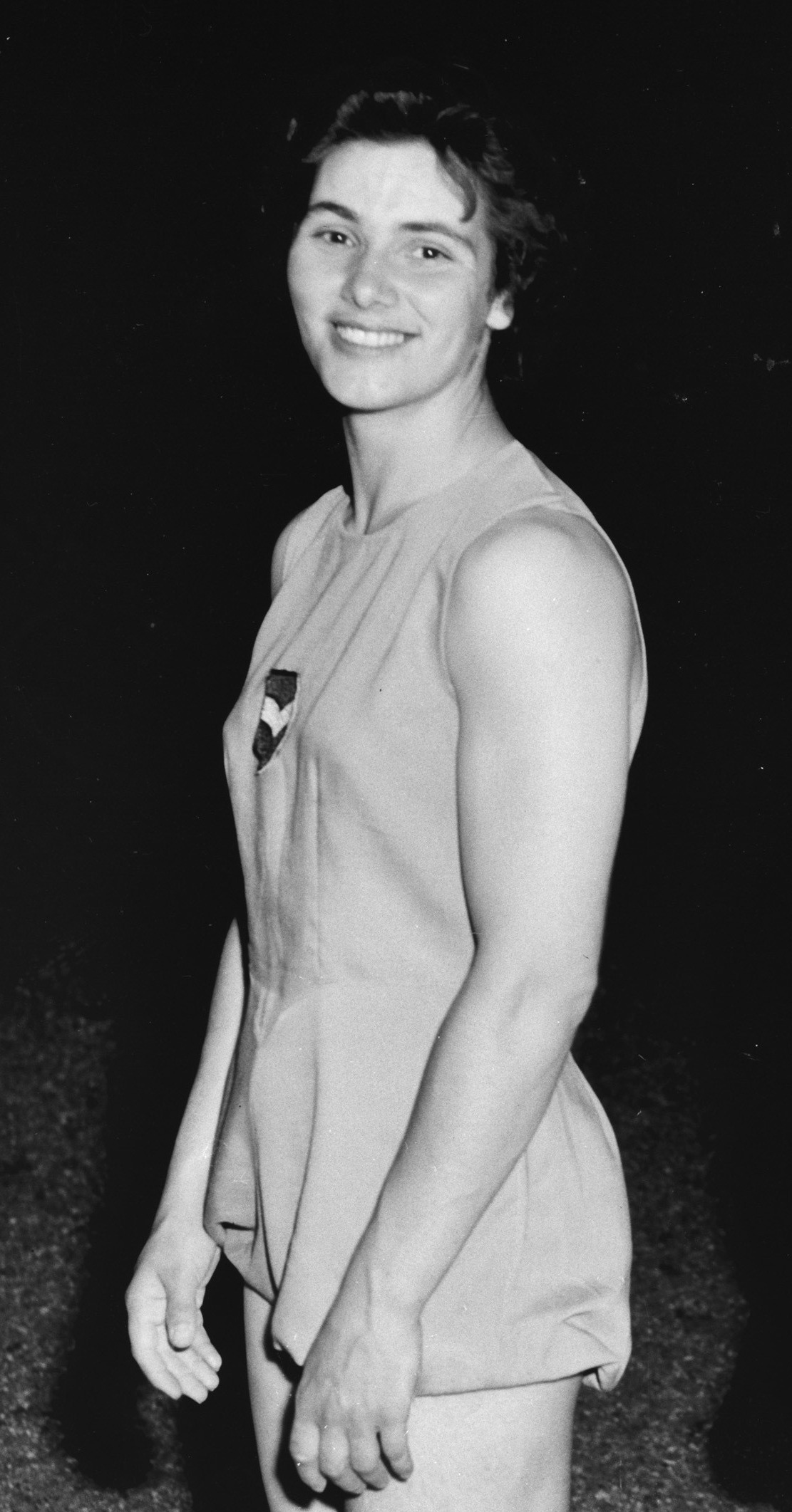 Olympisch Gymnastiekploegen. Huiberdina Krul